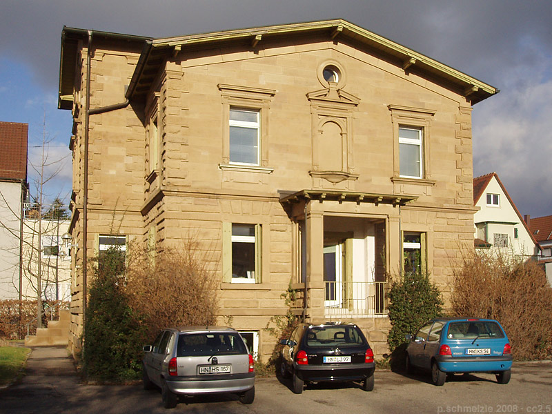 Gebäude Urbanstr. 19 in Heilbronn